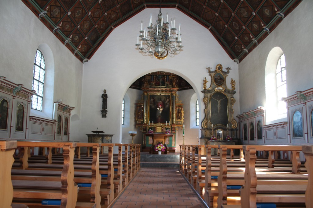 Innenansicht der Flüeli-Kapelle in Flüeli-Ranft.